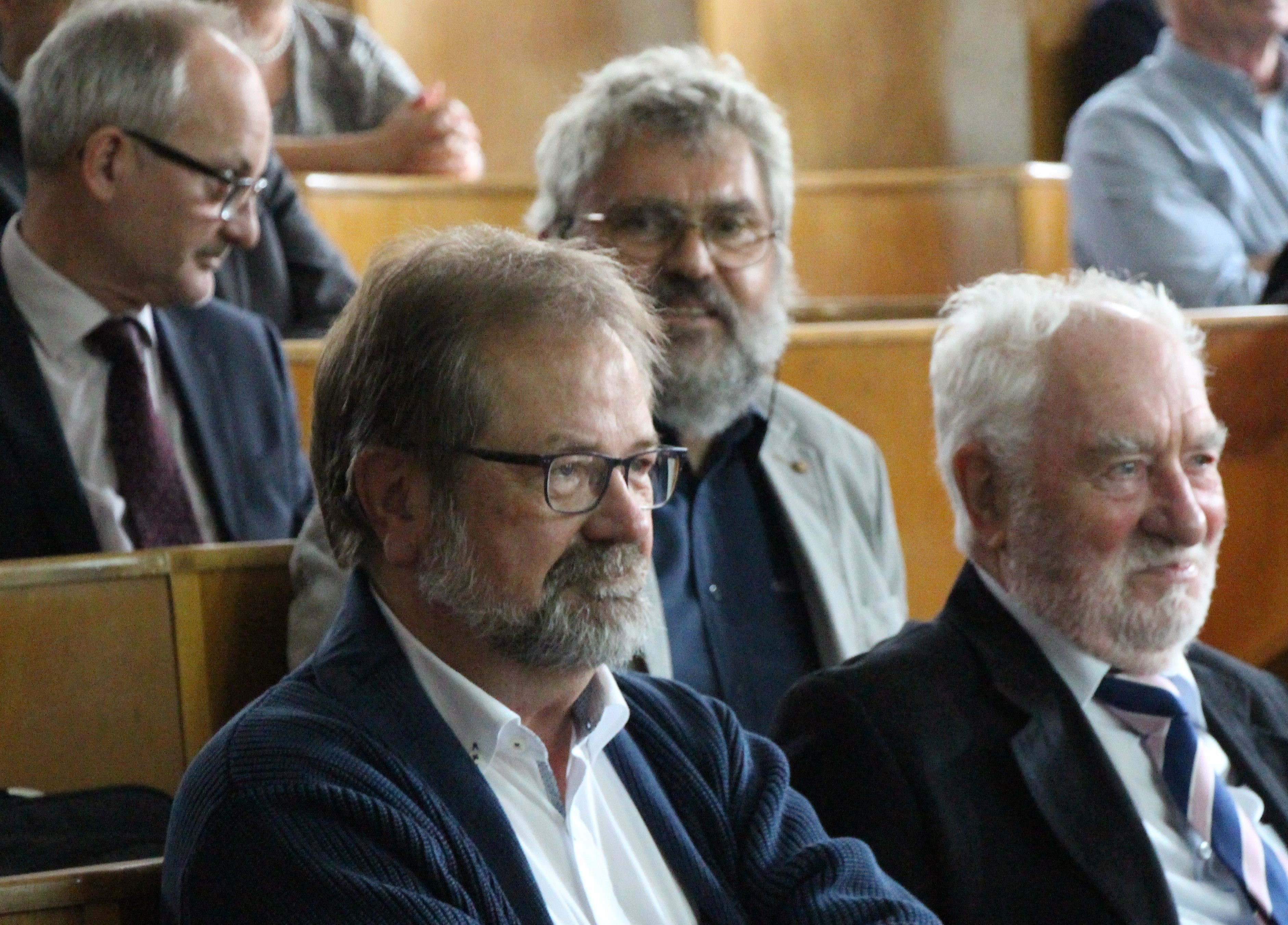 Werner Ebeling, Ehrenkolloquium an der HUB zum 80. Geburtstag, mit den drei Schülern Frank Schweitzer, Rainer Feistel, Horst Malchow (von hinten nach vorn)